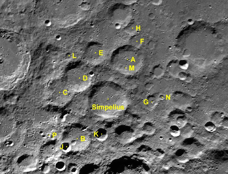 Cráter lunar Simpelius. Cráteres satélite. (Imagen LRO)